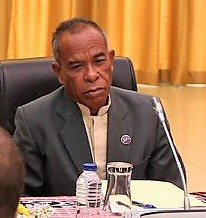 Eduardo de Jesus Barreto bei der Sitzung des Staatsrats